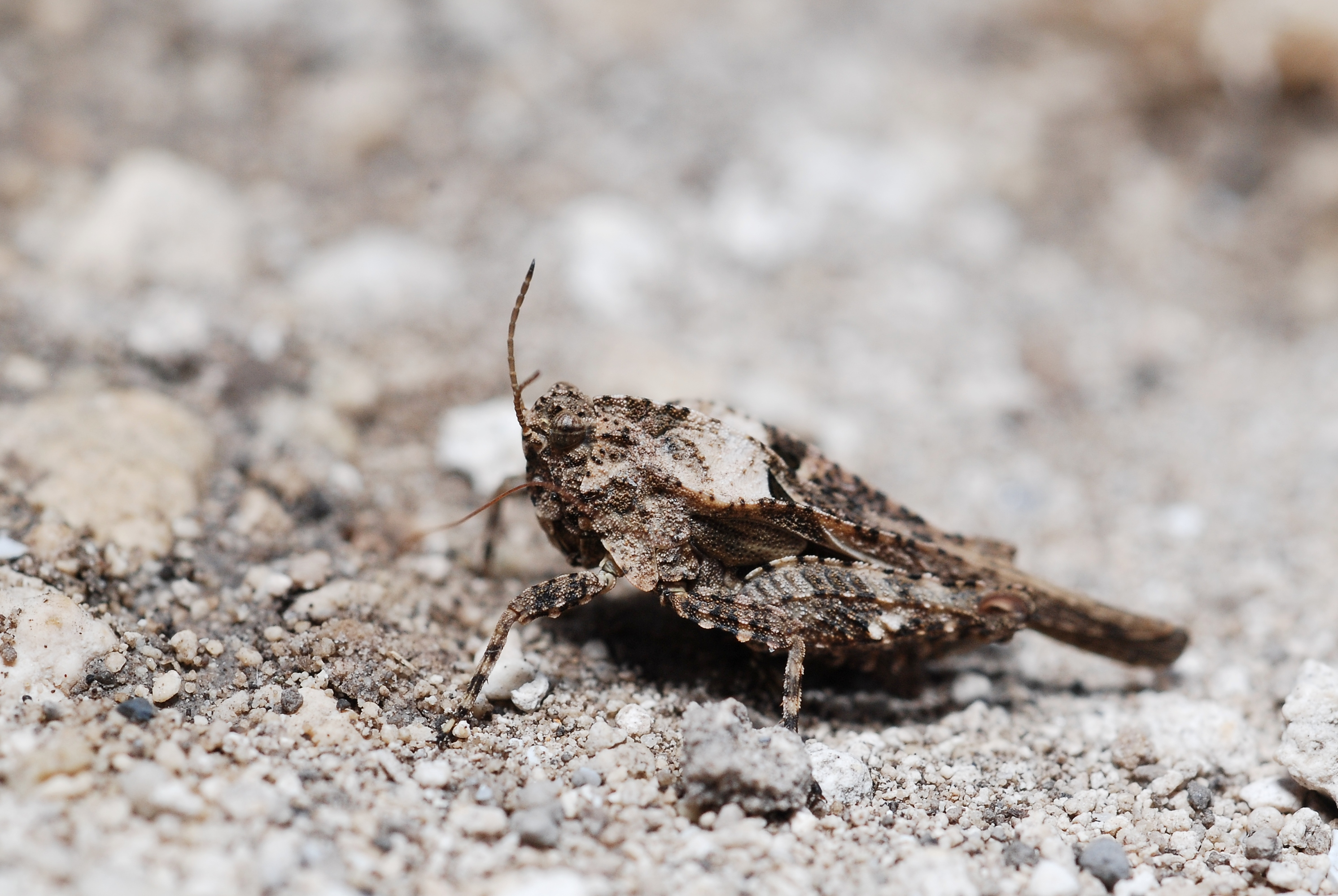 Depressotetrix depressa (macropronotal form)